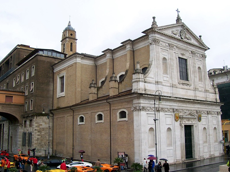 Roma - Chiesa di S. Girolamo dei Croati